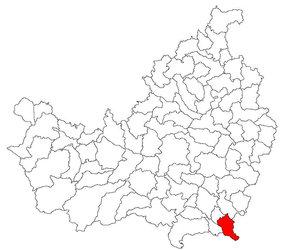 Comuna Luna, judeţul Cluj